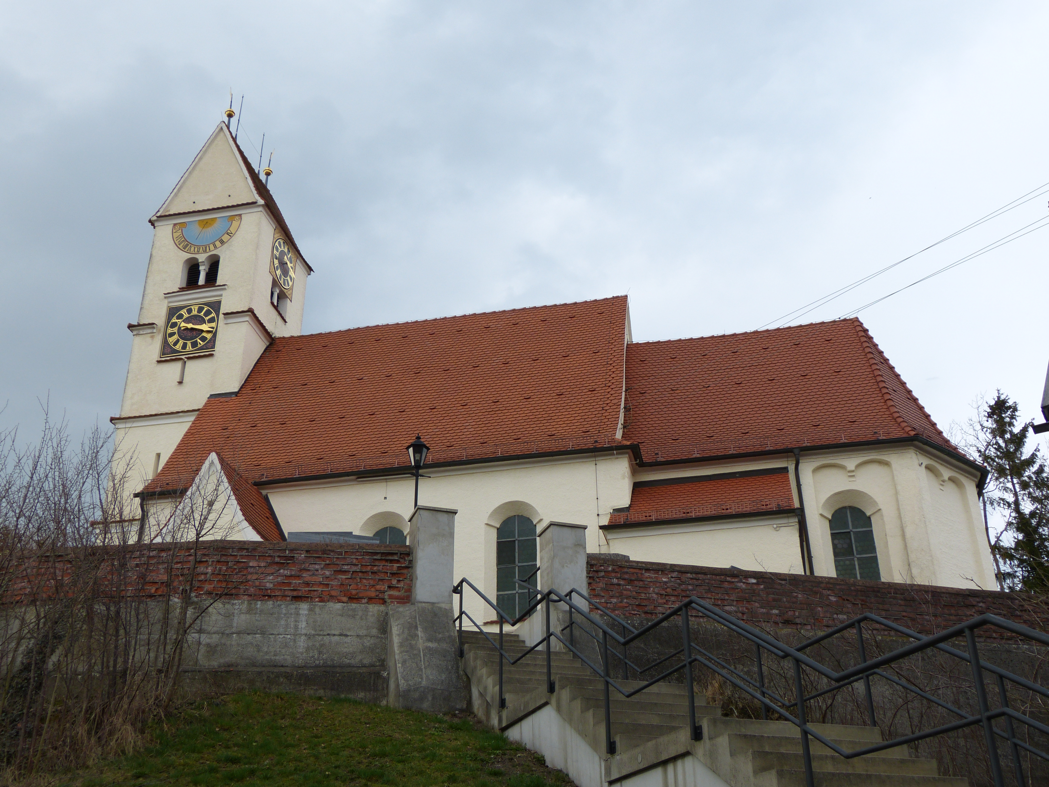 St. Vitus in Frickenhausen, Gemeinde Lauben, Landkreis Unterallgäu, Bayern